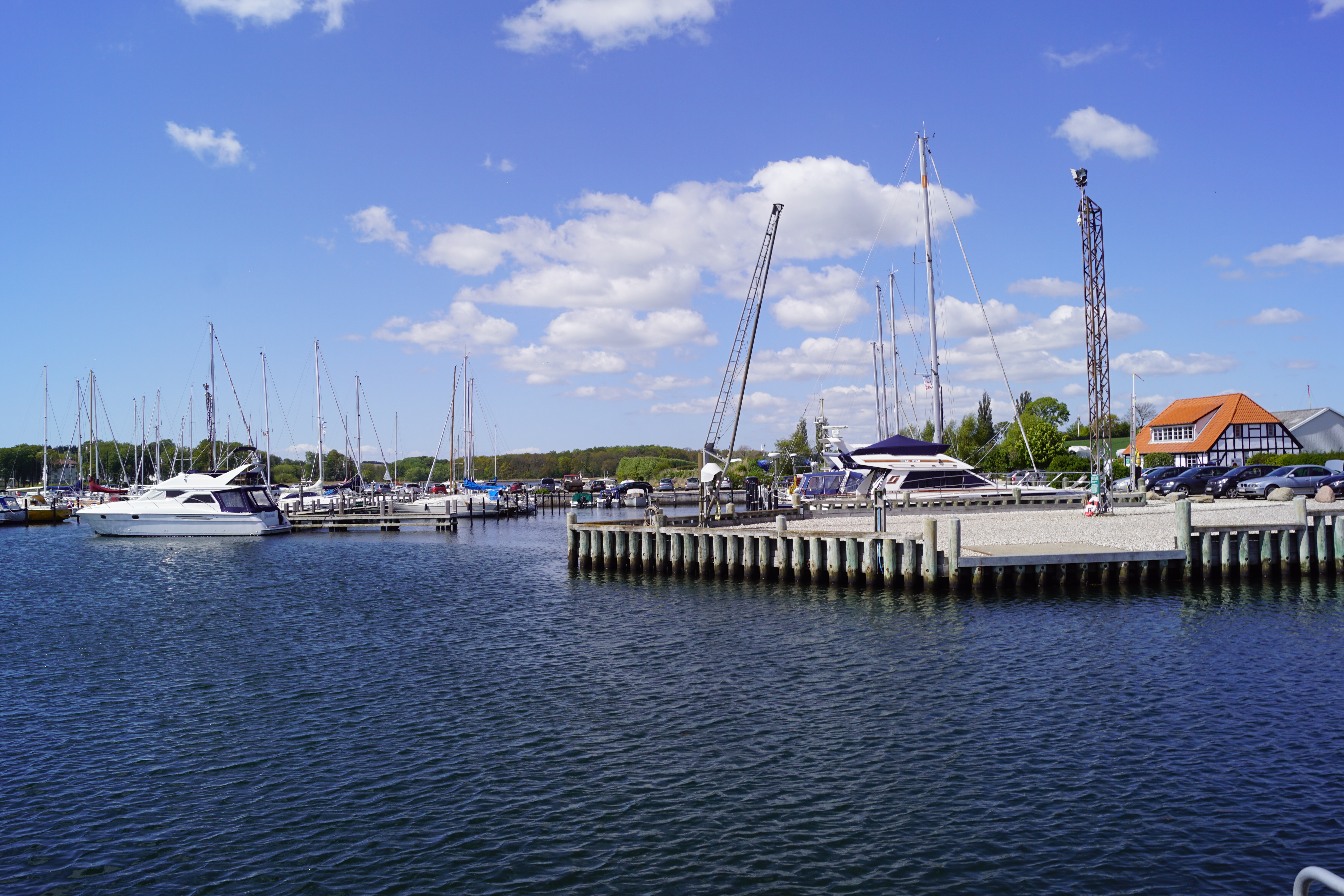 Fjællebroen havn set mod nord